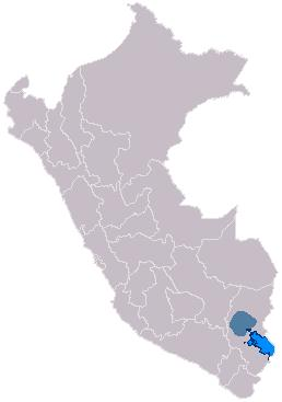 Mapa_cultura_pucara.jpg